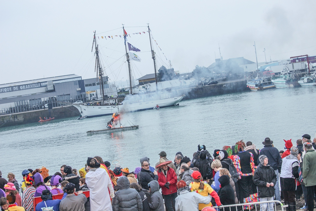 Une fois jugé coupable, le bonhomme carnaval est brûlé.